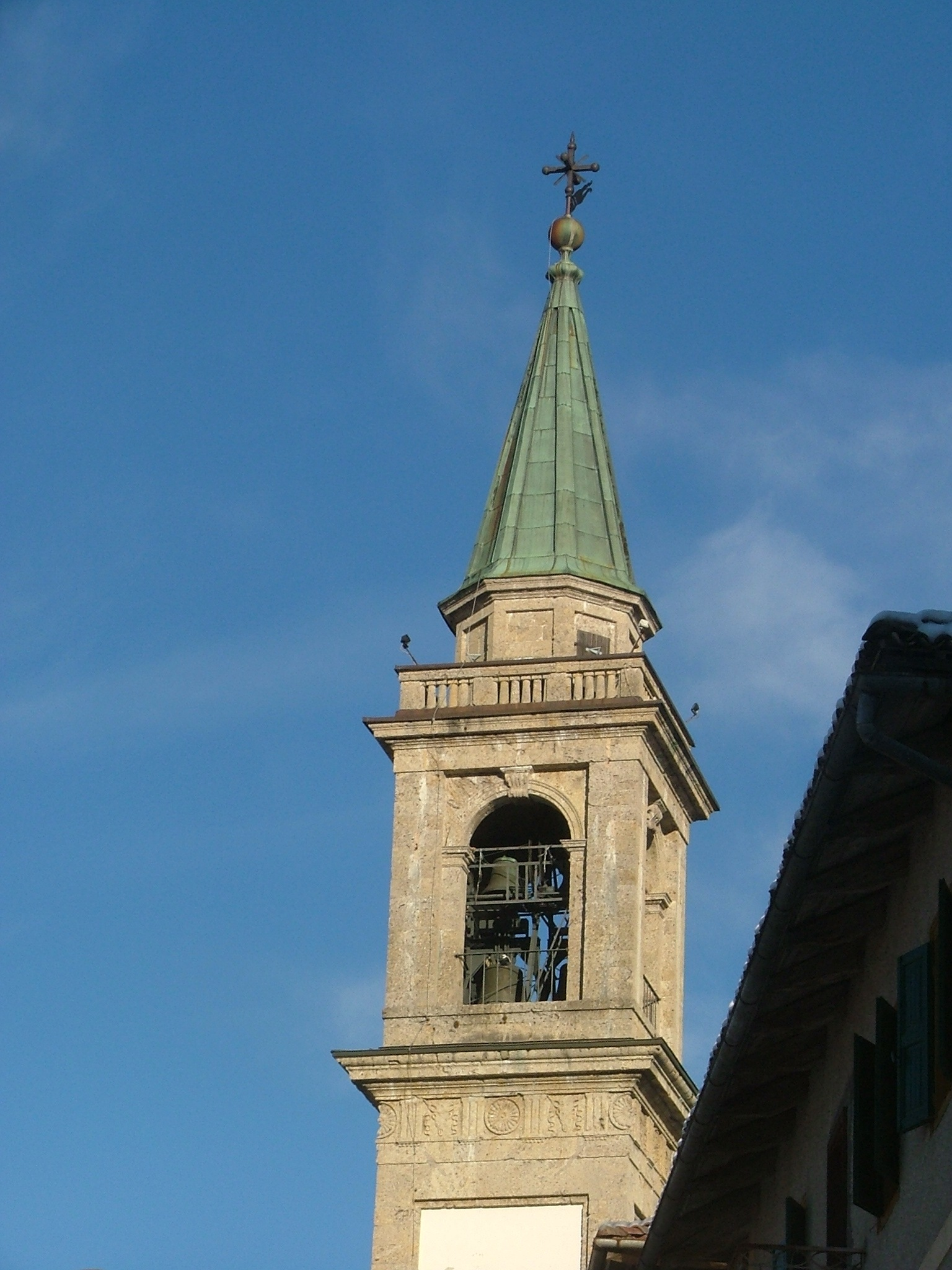 SS Ermagora and Fortunato's church-belfry, Lorenzago di Cadore, Belluno, Dolomites, Veneto, Italy